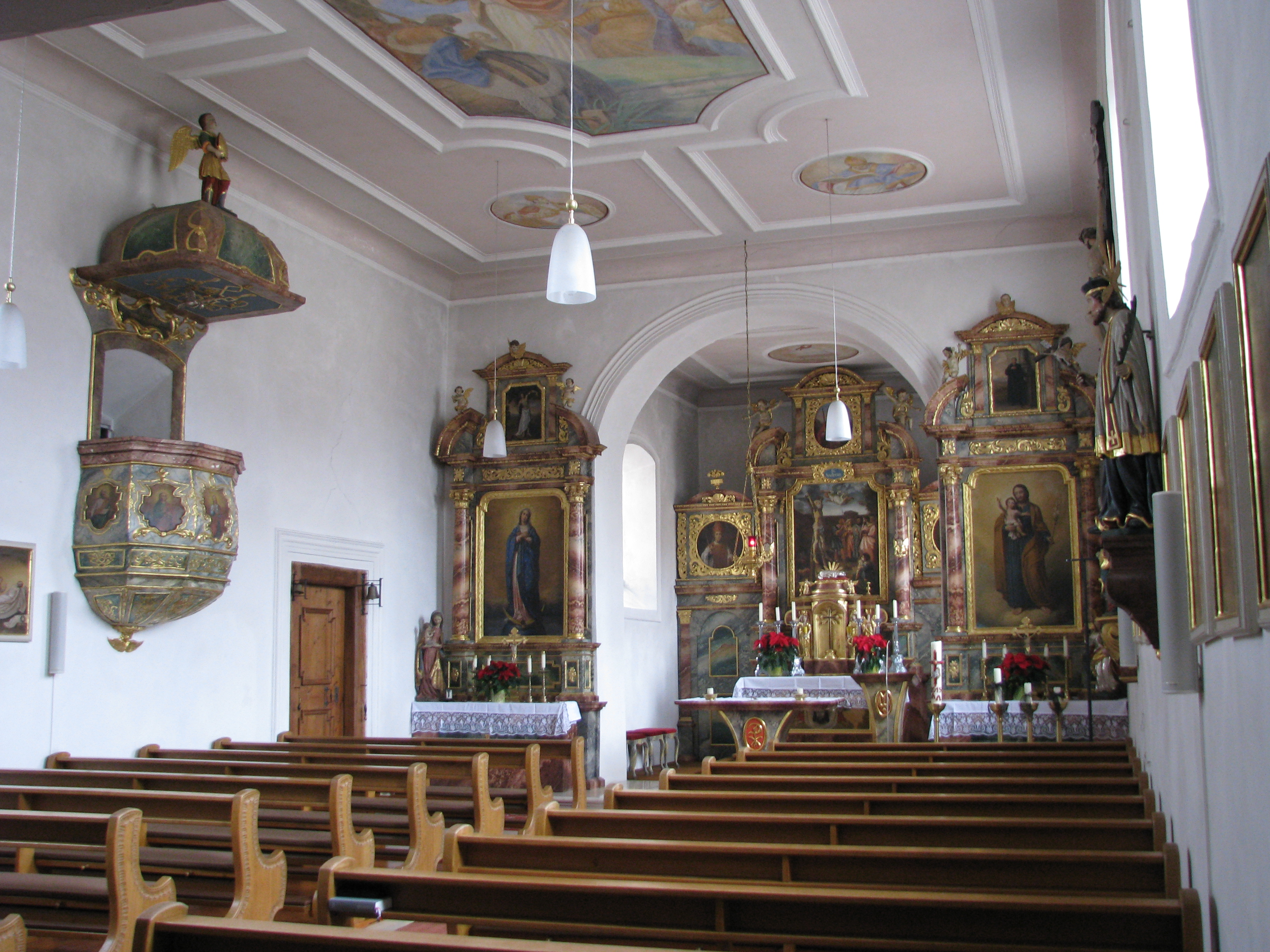 Kraftsbuch, Ortsteil von Greding im mittelfränkischen Landkreis Roth in Bayern, Katholische Filialkirche St. Andreas, Barock-Ausstattung